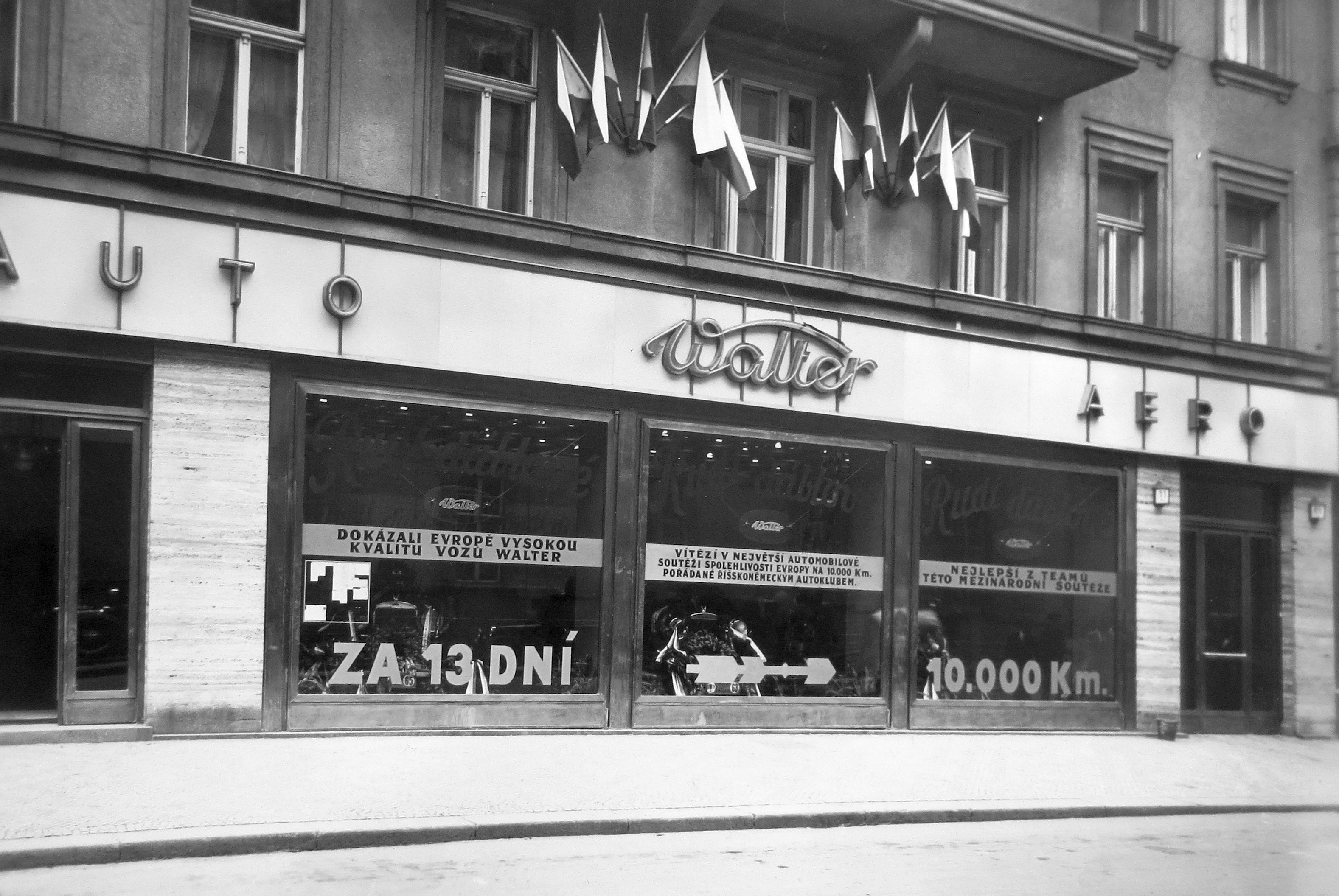 Walter Super 6 (1931) po vítězství v Jízdě 10 000 km AvD v reprezentační prodejně automobilů Walter (Platnéřská 11)